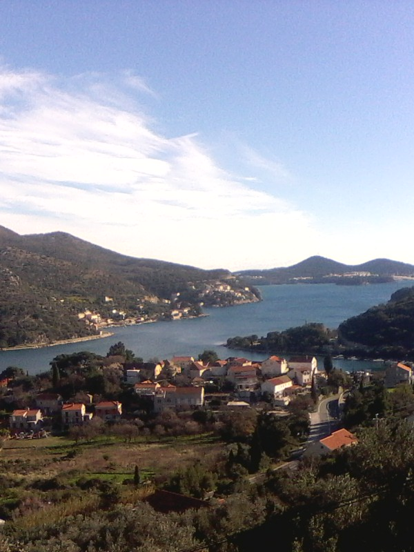 Zaton